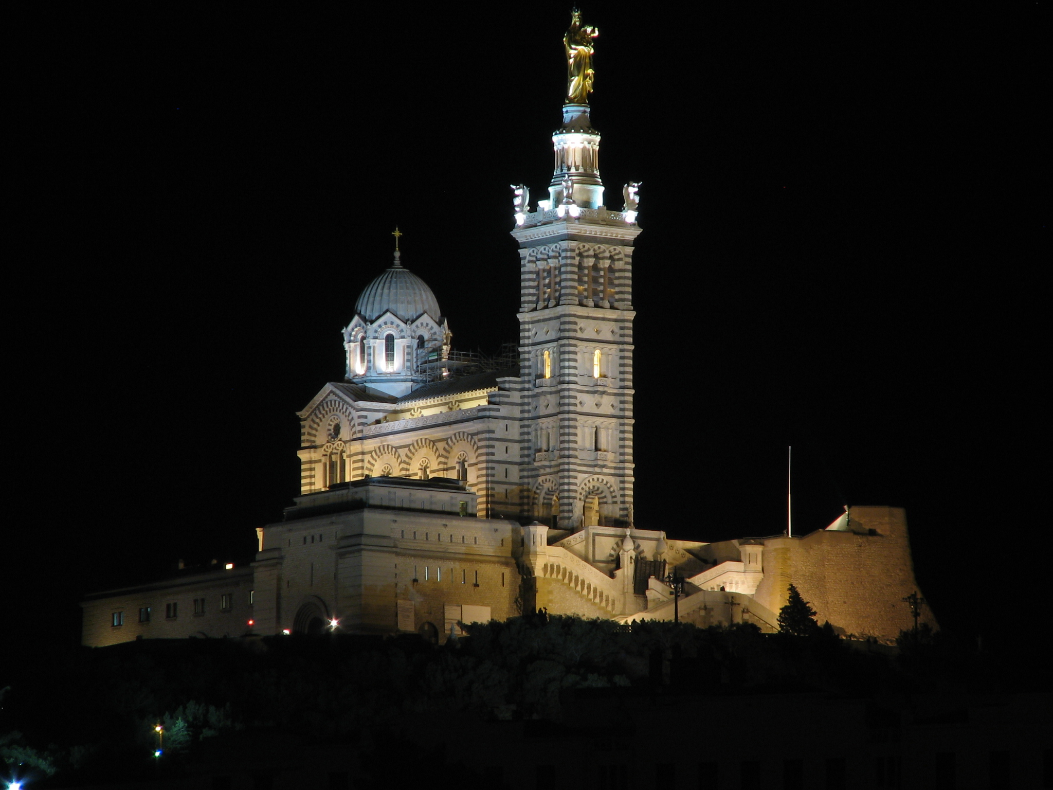 Notre-Dame de la Garde de nuit